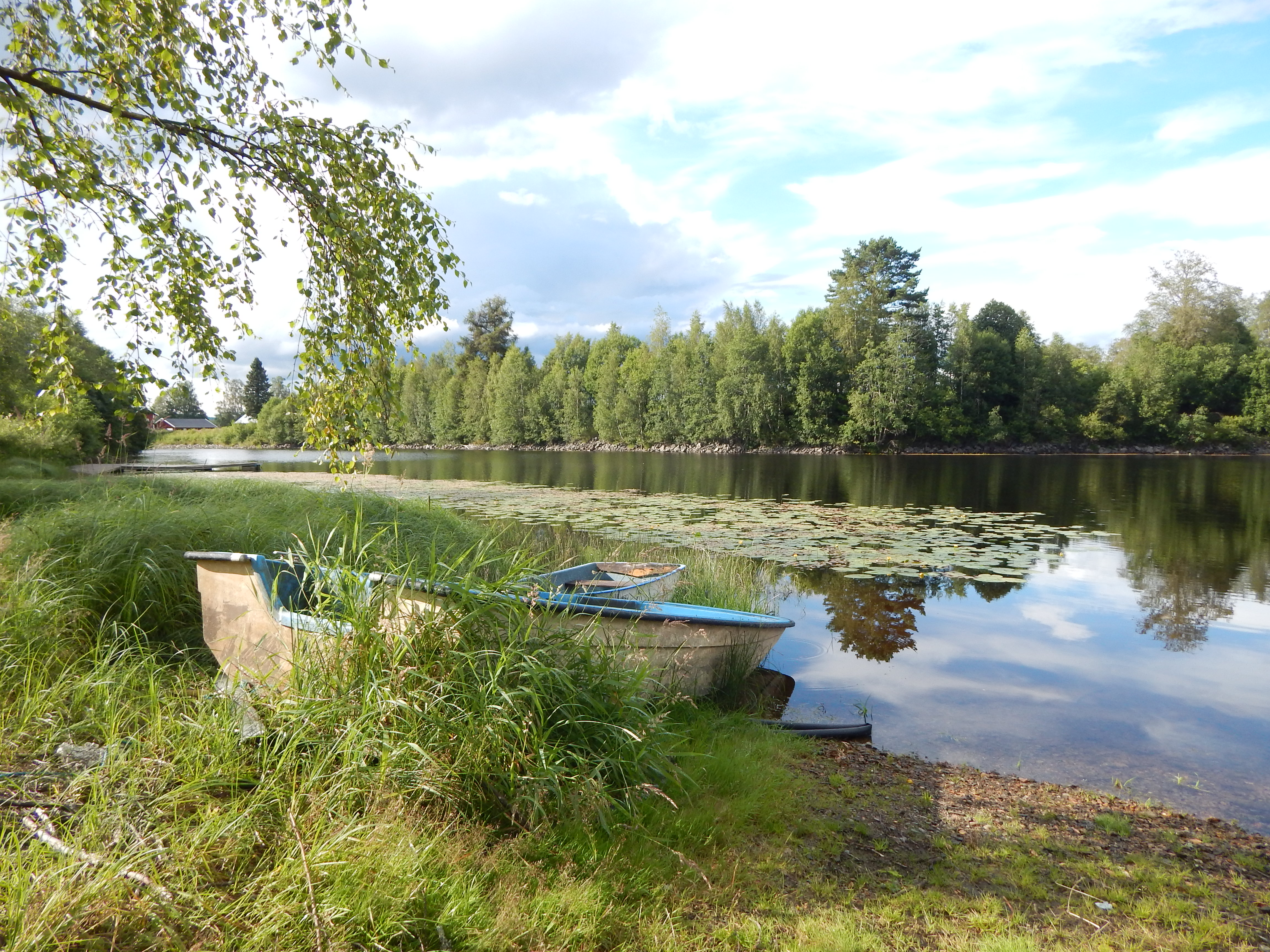 Oppstadåa i Sør-Odal